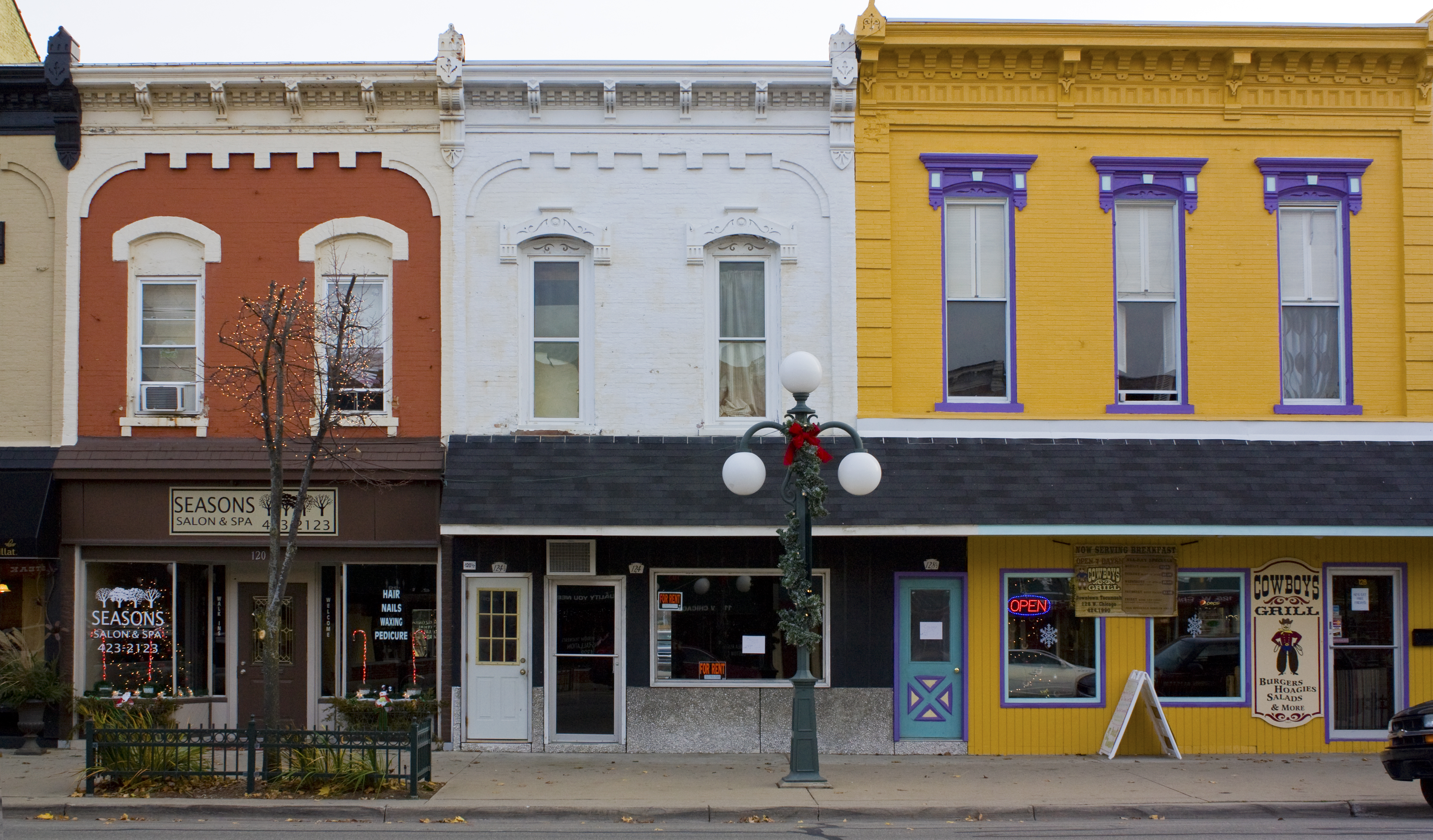 Tecumseh Michigan